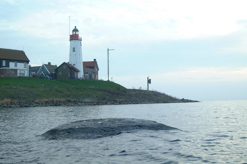 Ommelebommelesteen